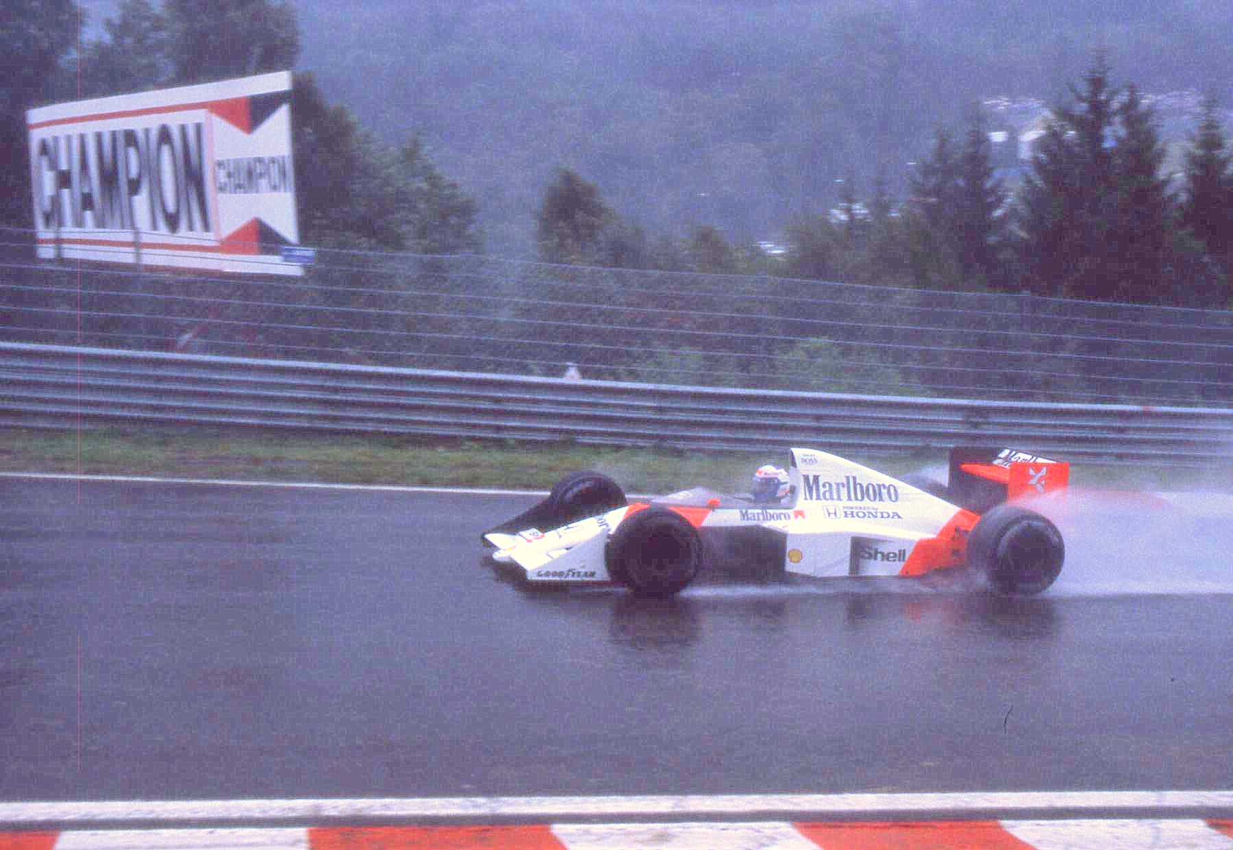 Alain Prost - McLaren-Honda. Scan diapo argentique.